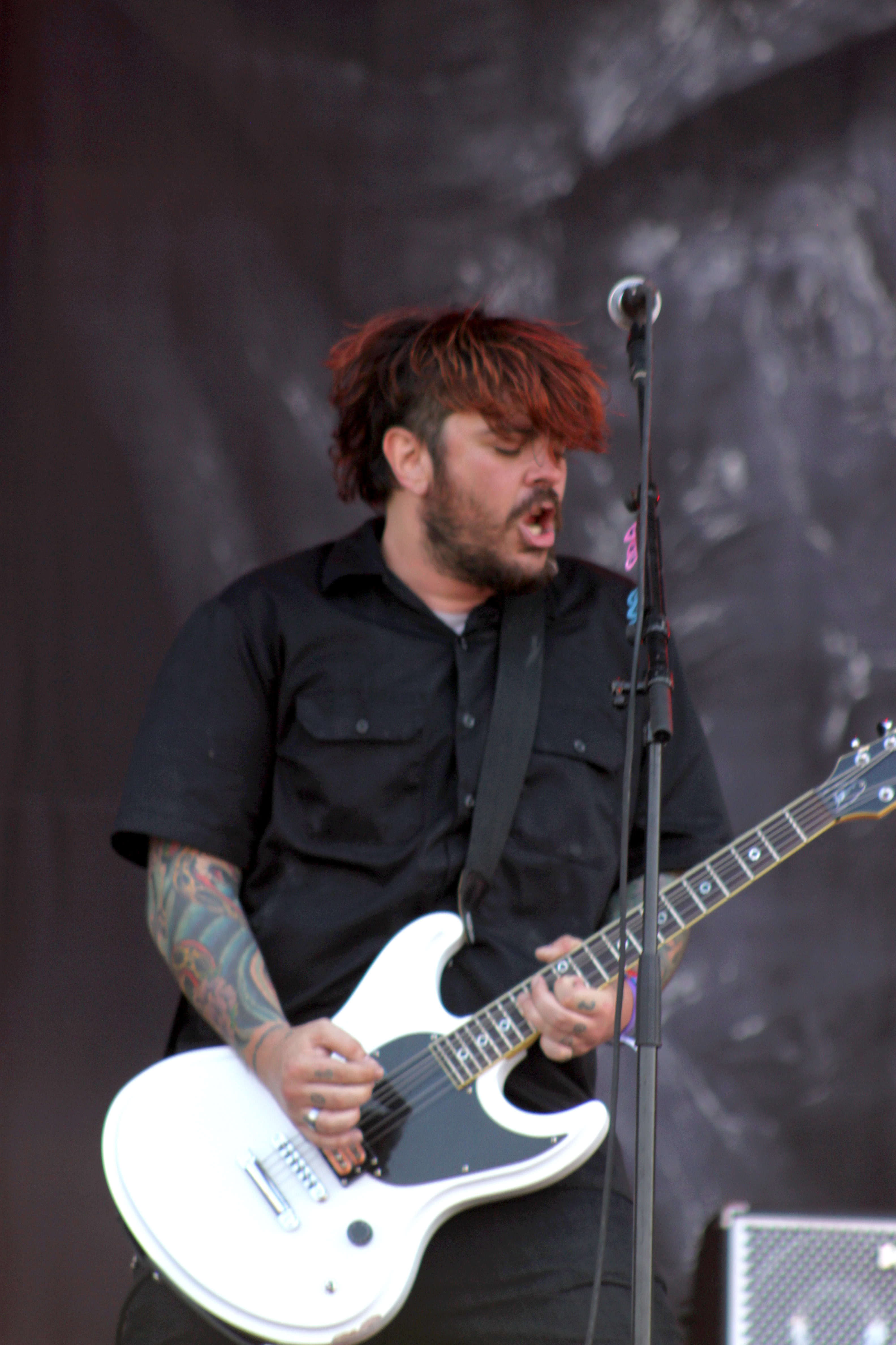 Hellfest 2014. Shaun Morgan, Seether. Fr-44-Clisson.